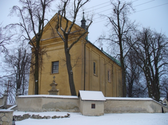 Kościół pw. Św. Benedykta Opata w Imbramowicach